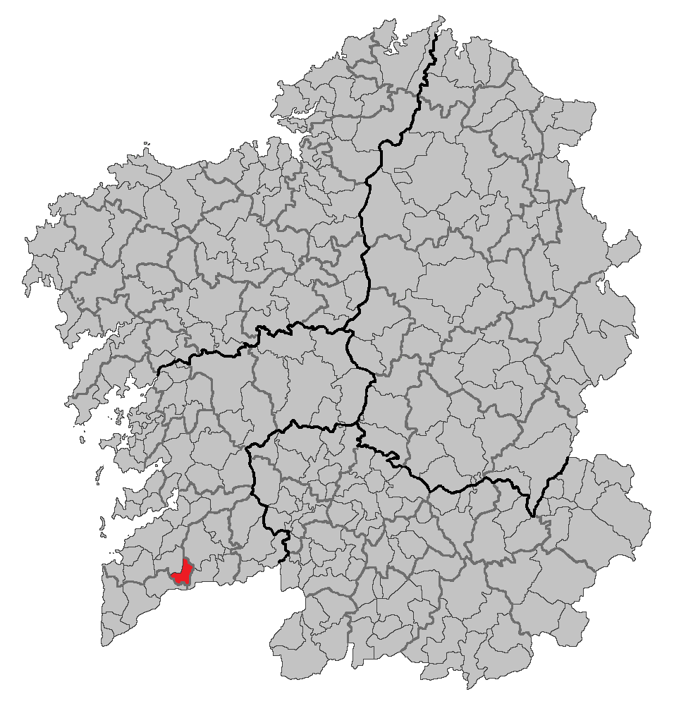 Mapa coa localización do concello de Salceda de Caselas.